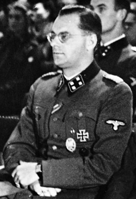 Sturmbannführer Bruno F. M. Boysen ved Schalburgkorpsets mindehøjtidelighed for faldne danske frivillige på Østfronten i Frimurerlogen